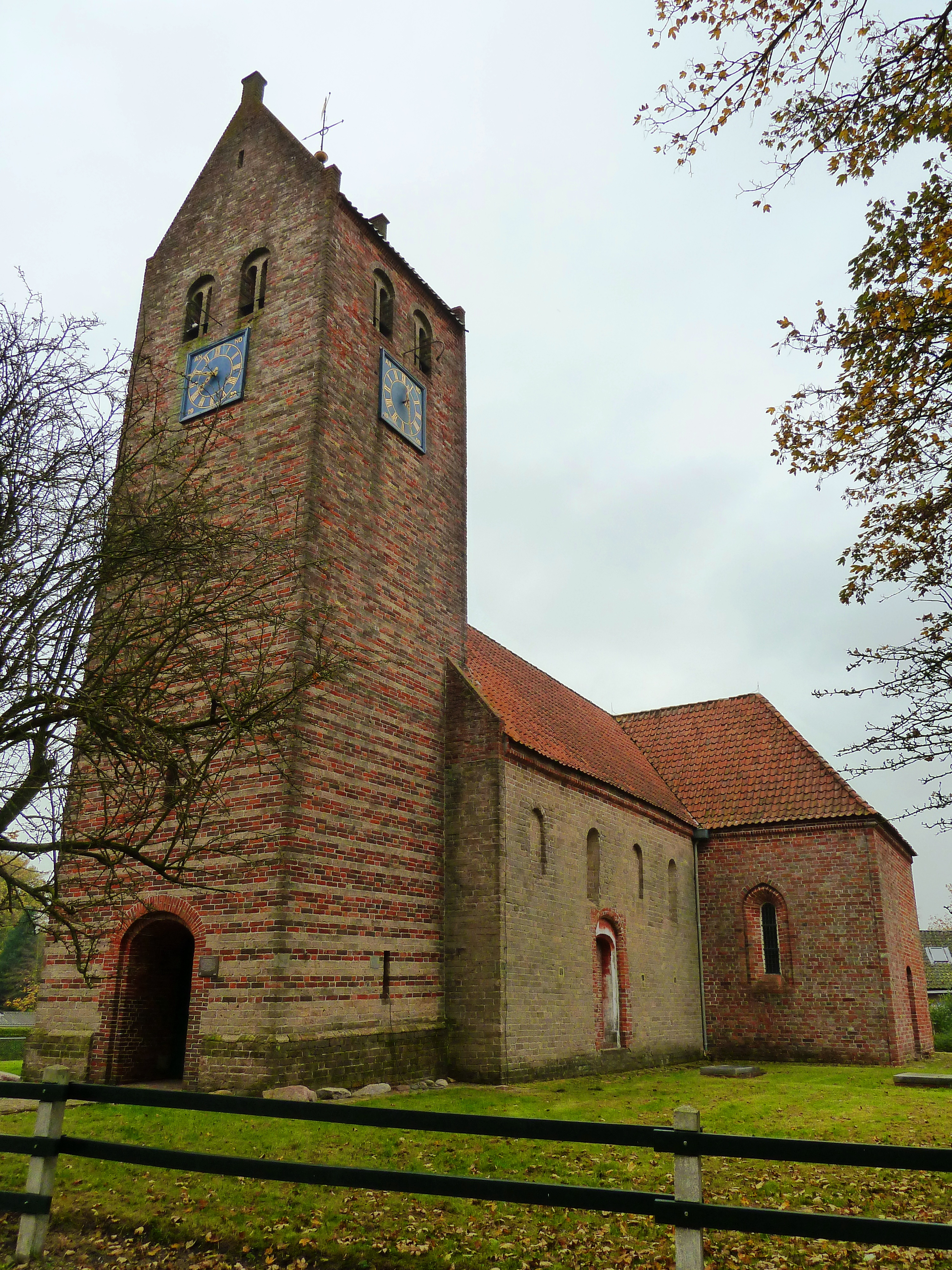 Hervormde kerk van Niekerk, voorzijde.